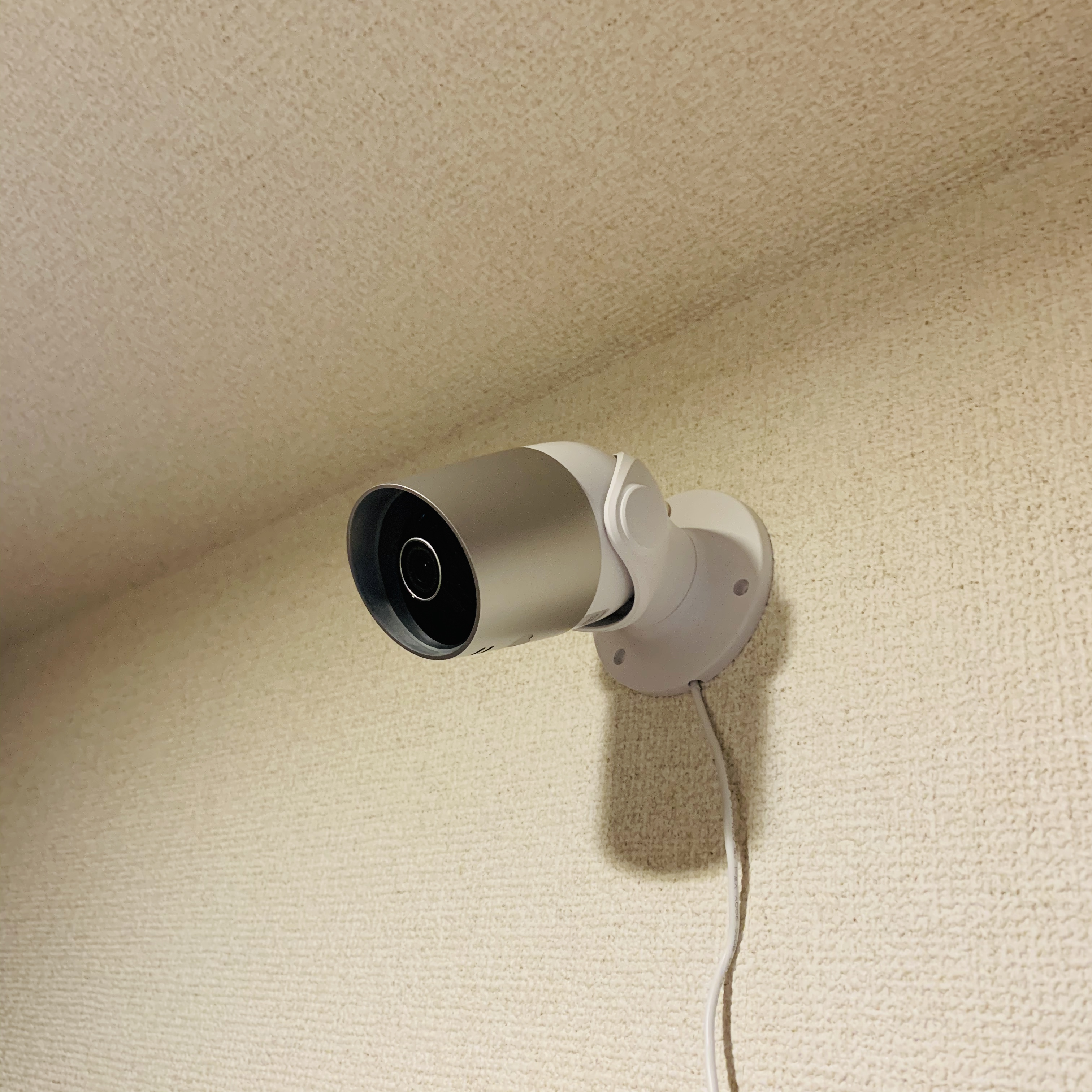 スマートセキュリティカメラ